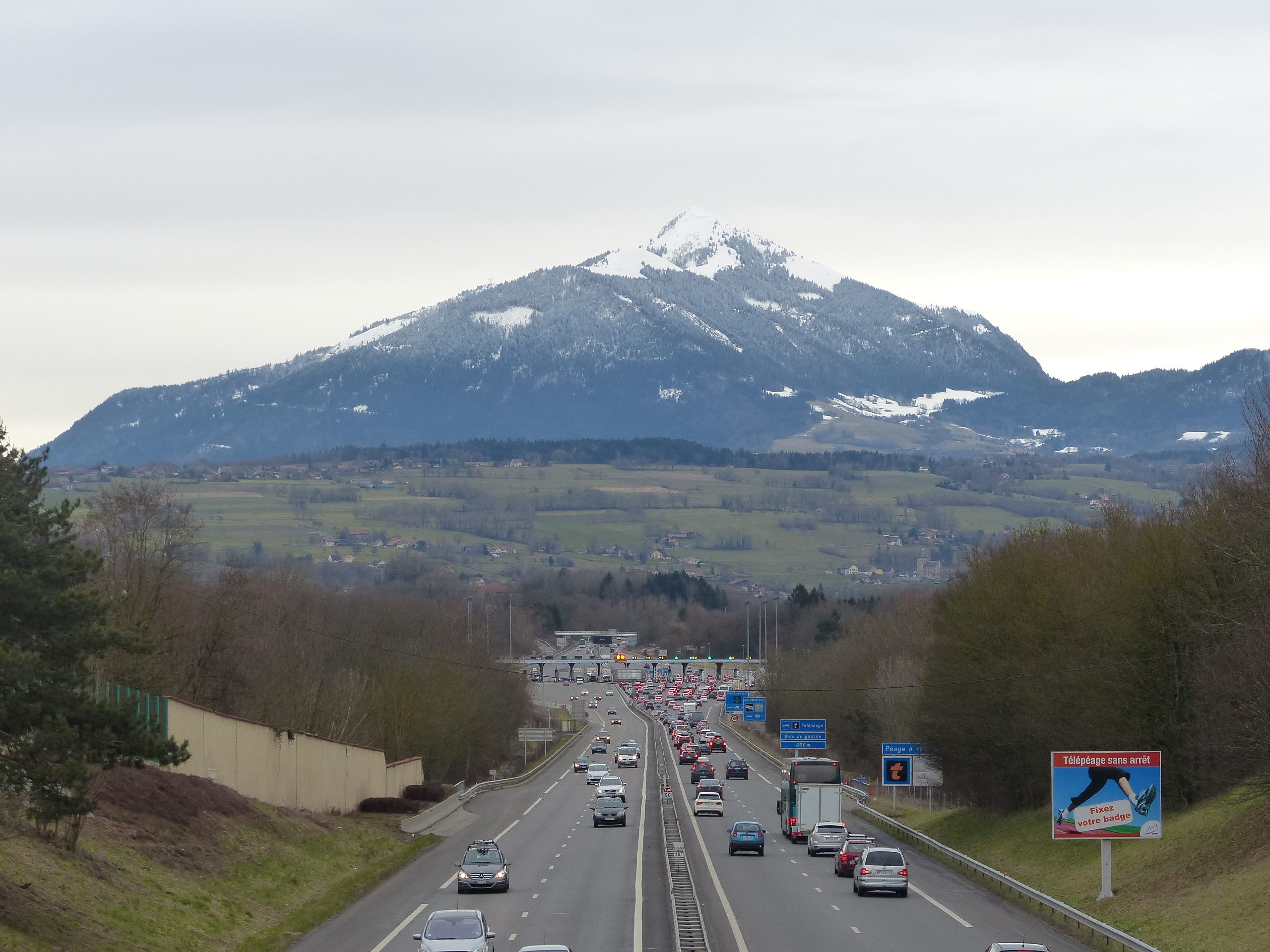 Des vacanciers de février 2014 arrivent au péage de Nangy sur l'autoroute française A40, face au Môle.